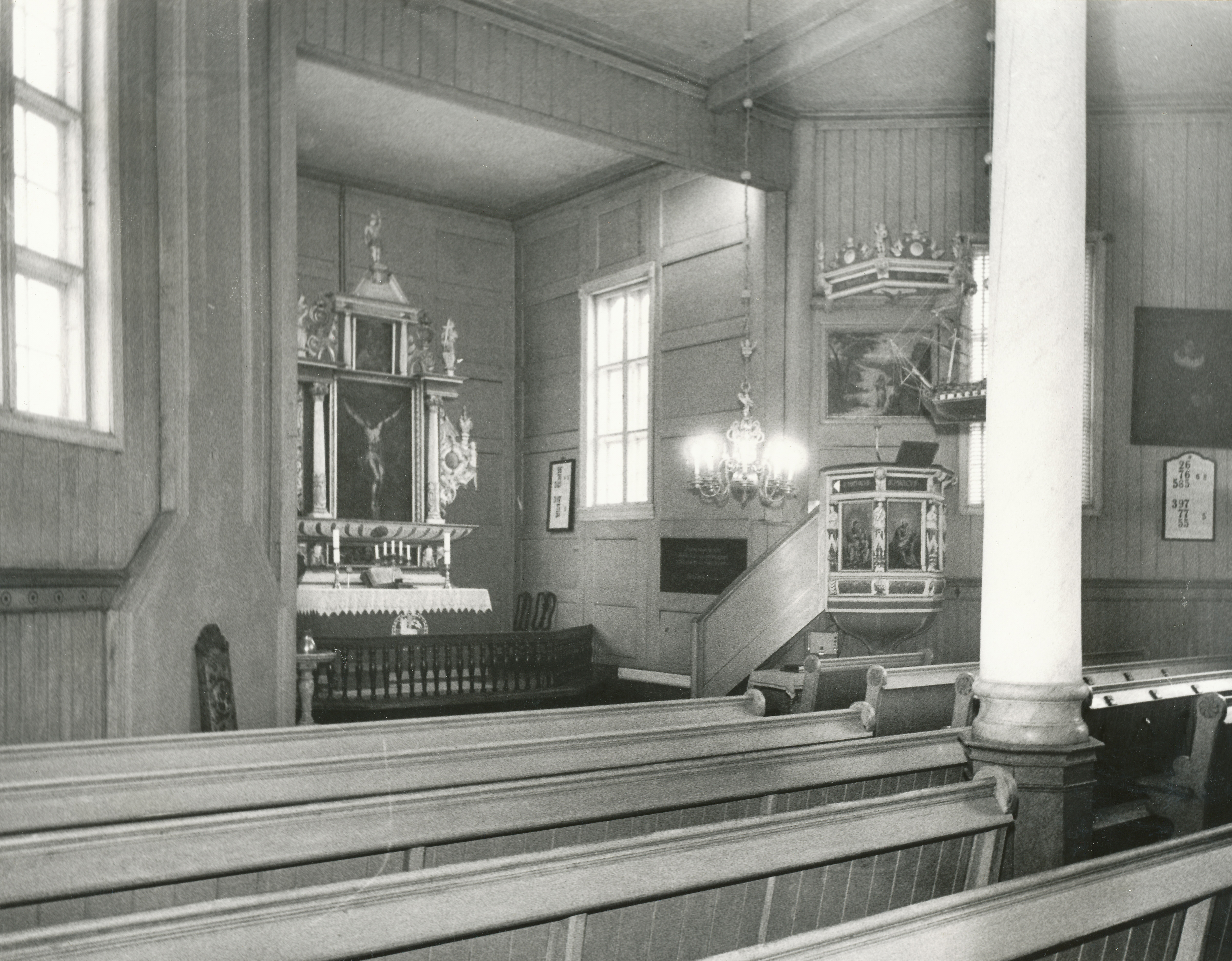 Interiør fra Hospitalskirken i Trondheim. Bygget i 1705. Se også artikkel om "Kirkene våre" i Adresseavisen 4. desember 1965 av tidligere Byarkivar Løkhaug. Foto: Monrad Kjellby.